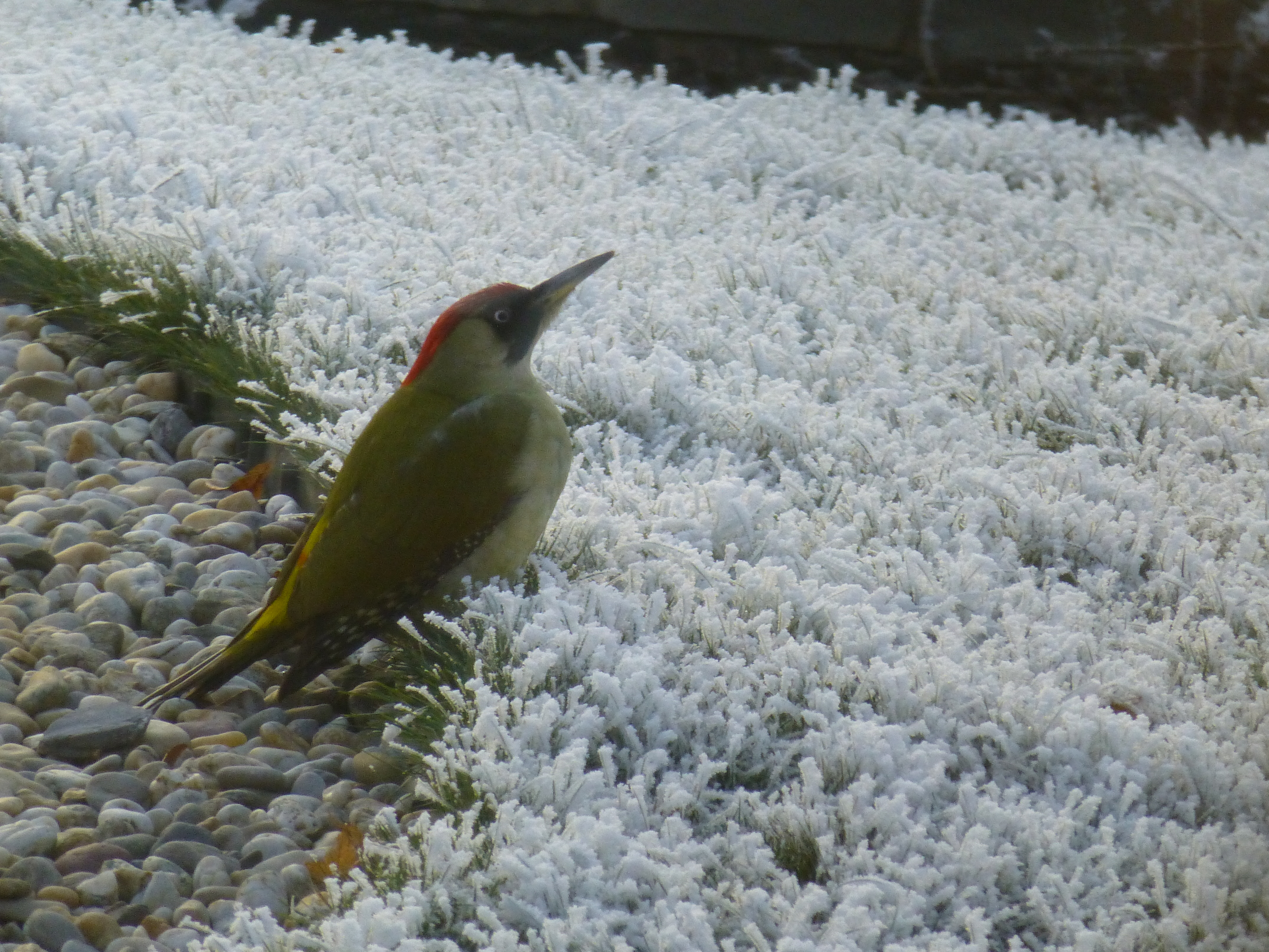 Žluna zelená, fotografováno v lednu 2017, střední Morava